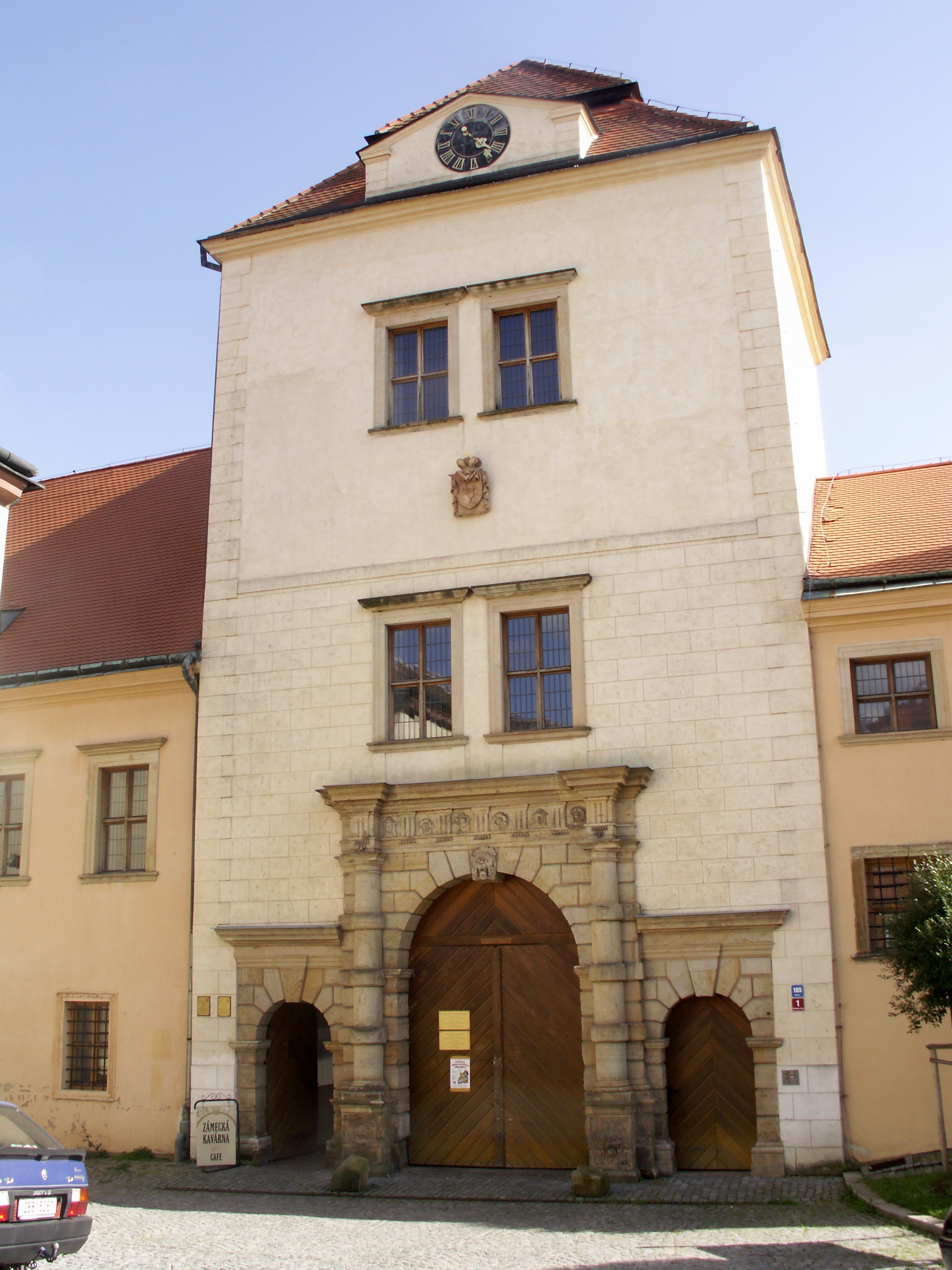 Vstupní brána na zámek Moravská Třebová